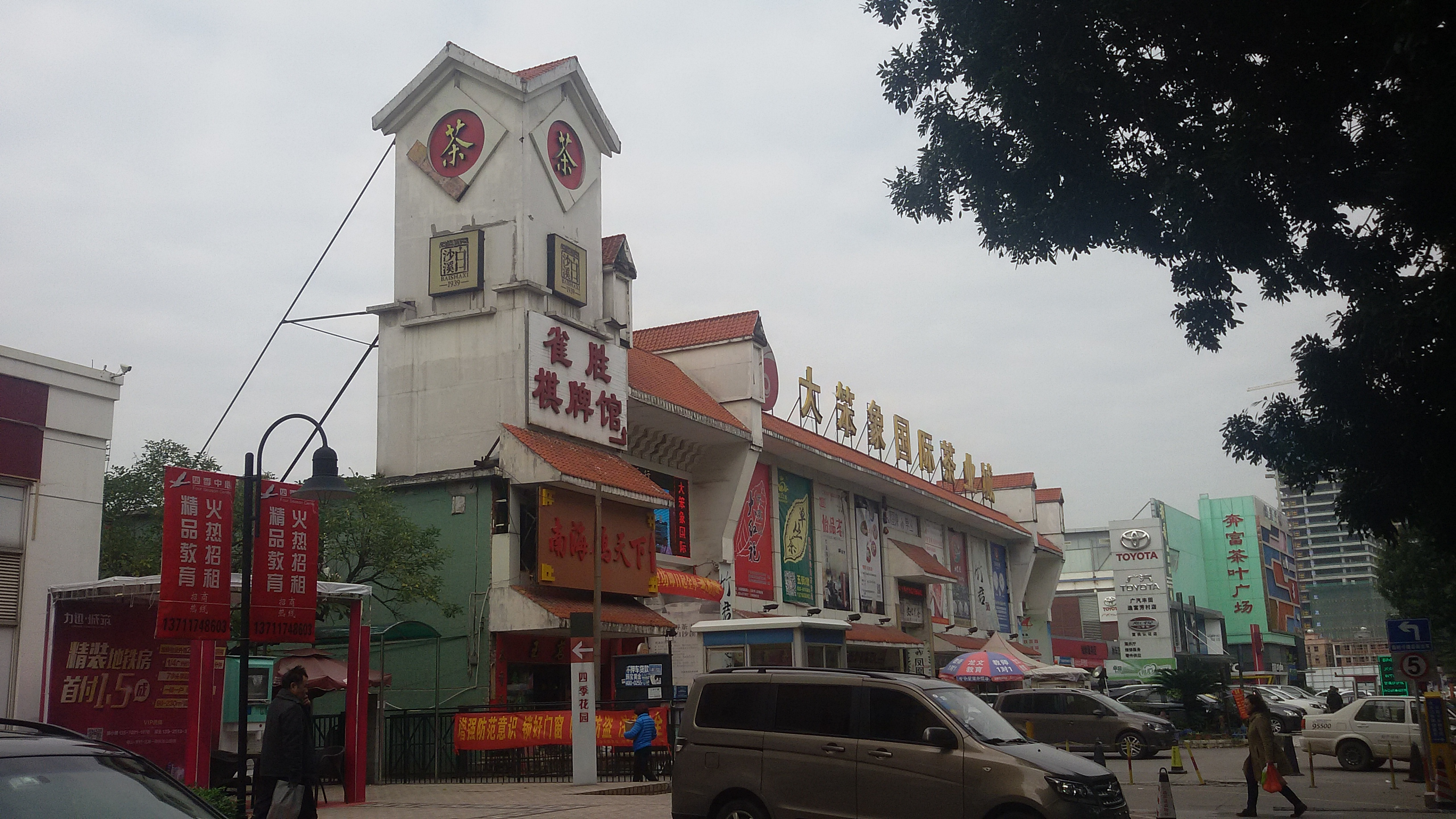 粵語: 大笨象國際茶業城